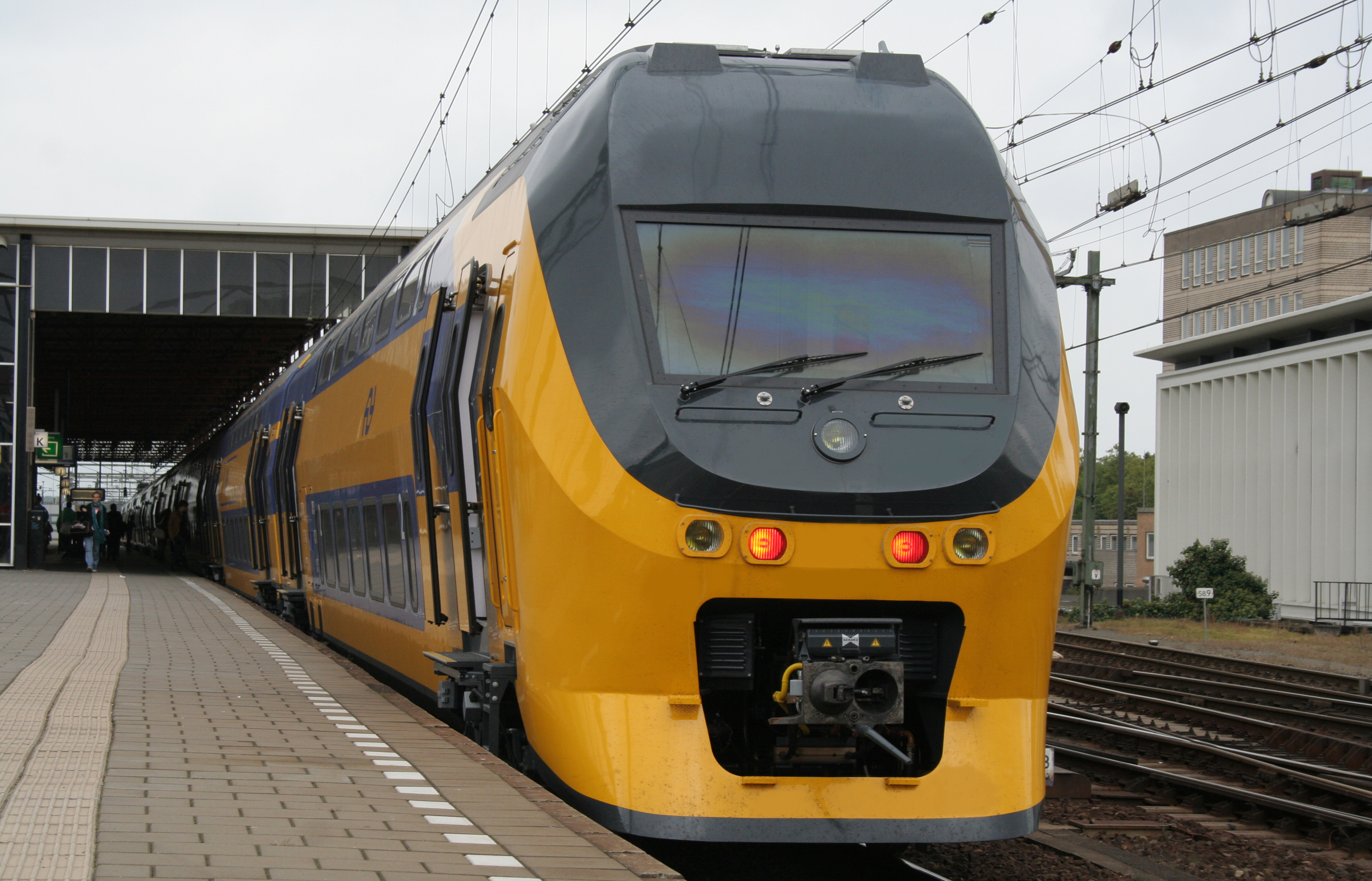 Nieuwe VIRM-4 IV te Eindhoven op 23 september 2008